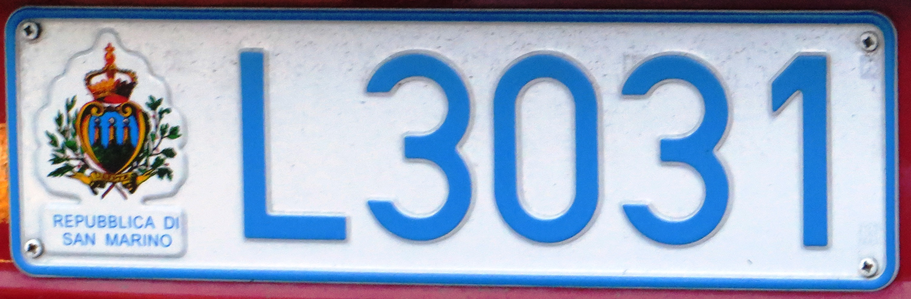 kentekenplaat San Marino